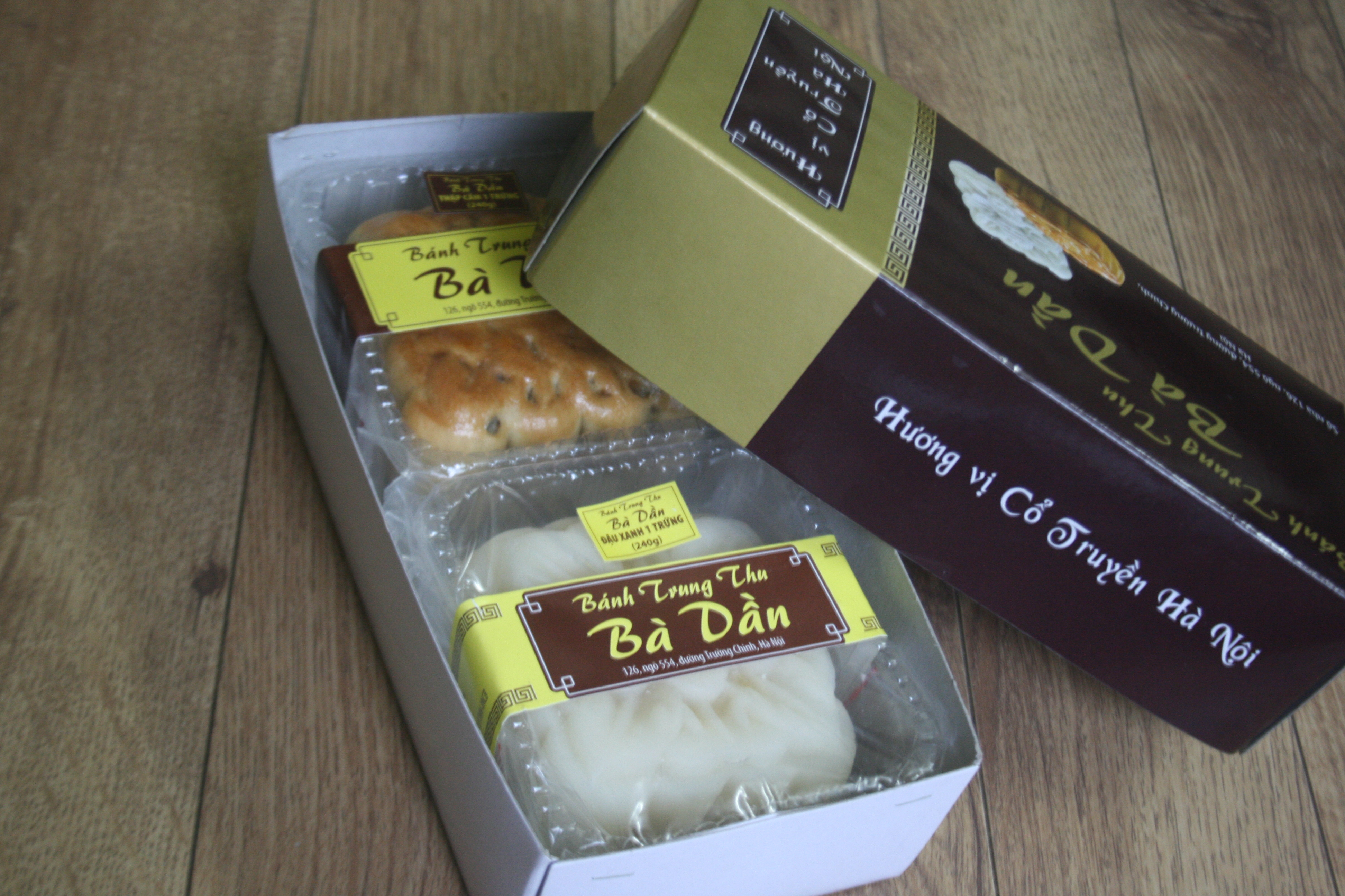 Hộp bánh trung thu của một cửa hàng bánh gia truyền tại Hà Nội